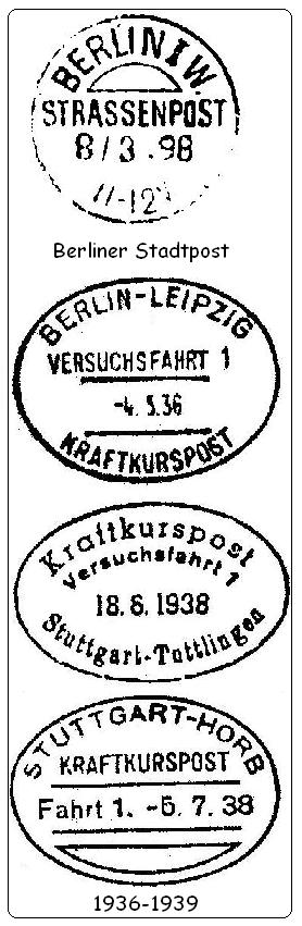 Beispiele für Deutsche Straßenpoststempel der Deutschen Bundespost